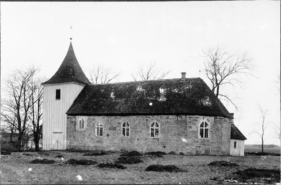 Kyrkan från söder. Kategori: (01) Exteriörer Kyrkan från söder.